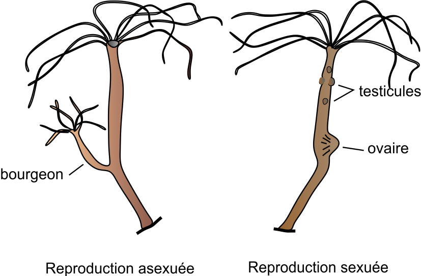 L'Hydre verte (Hydra viridissima), reproduction asexuée par bourgeonnement et reproduction sexuée. Dessinée sous Corel Draw d'après Beaumont & Cassier, Biologie animale, Dunod 1973